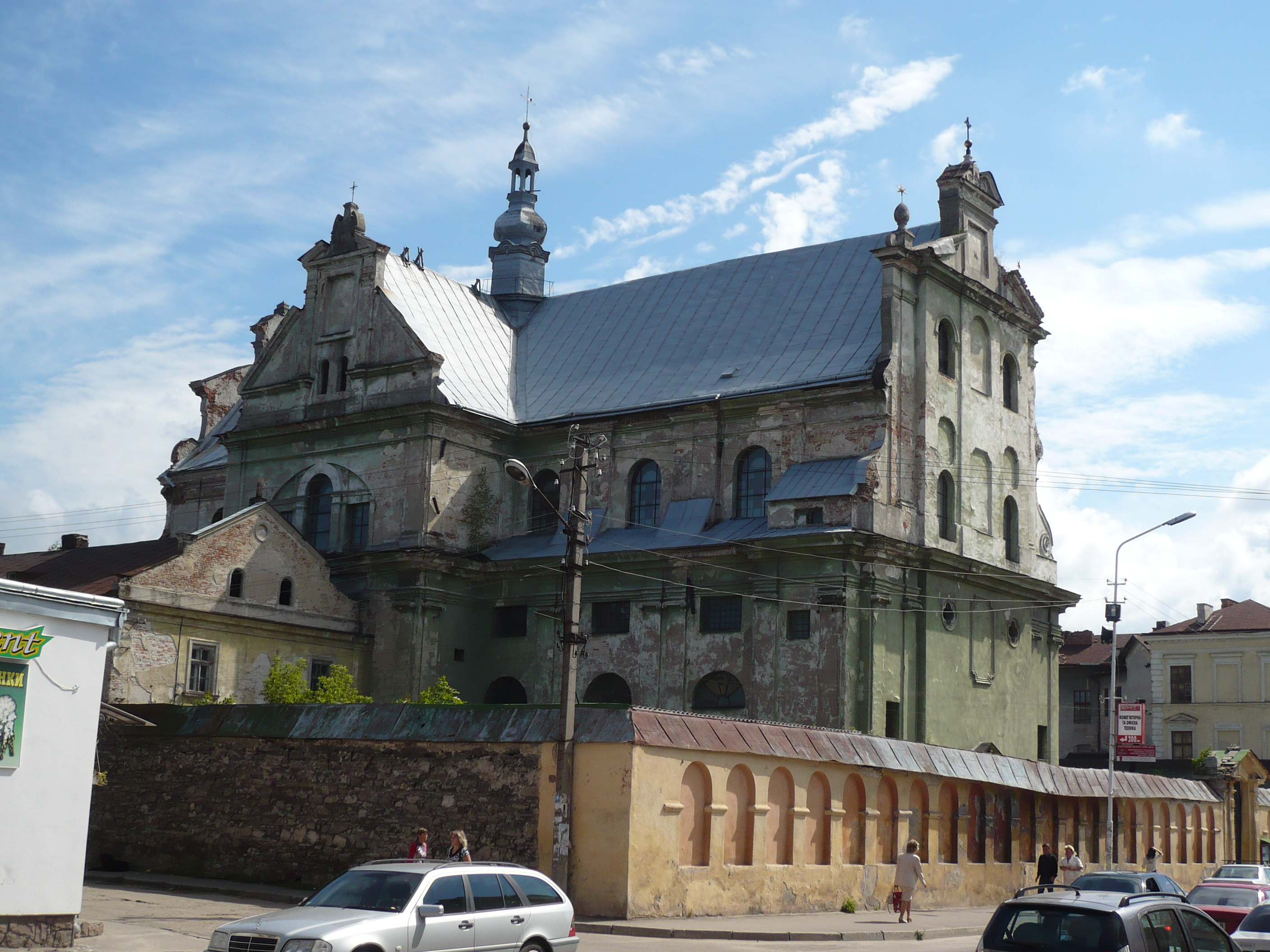 Kościół pw. Wniebowzięcia NMP - oo. dominikanów